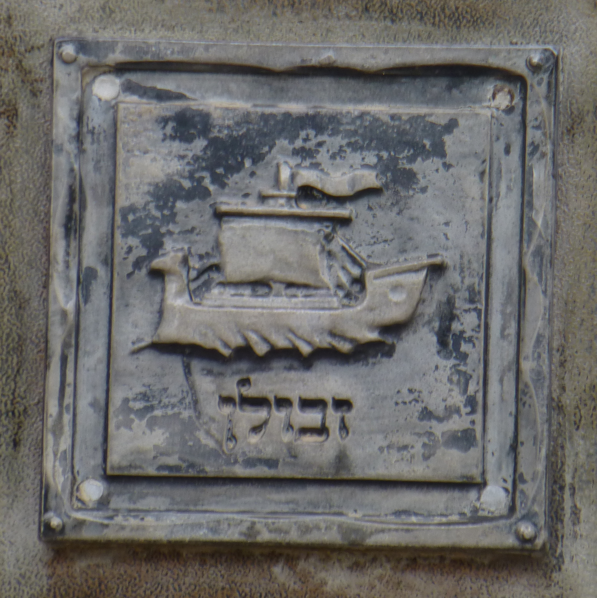 בית הכנסת הגדול "אוהל שרה" - בית הכנסת הראשון של רחובות, נבנה בשנת תרס"ד? ובהמשך שופץ והורחב והיה למוקד הקהילתי והחברתי של המושבה הצעירה.